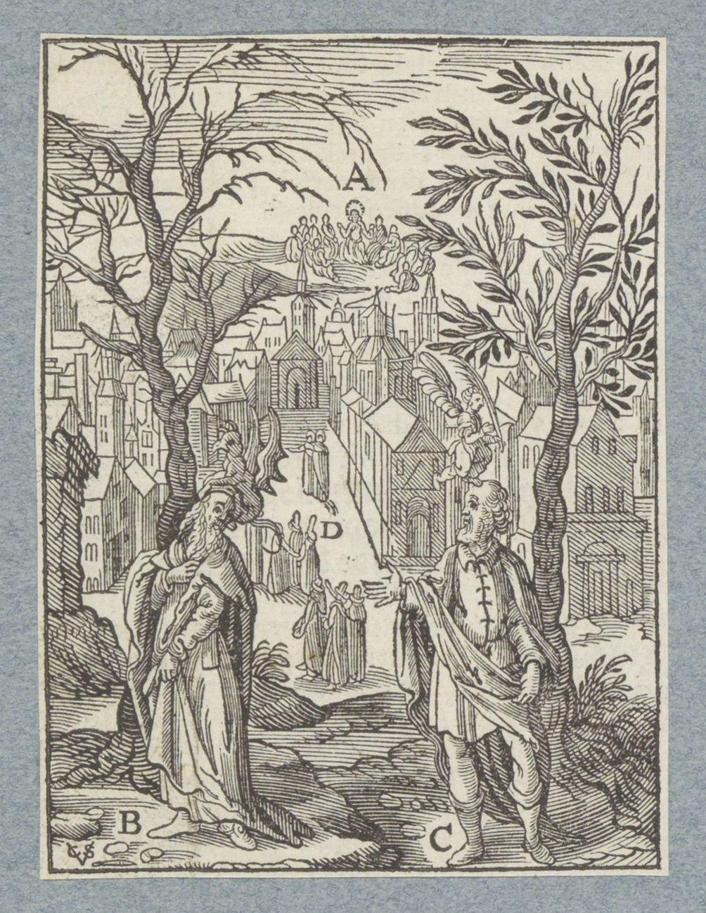 IdentificatieTitel(s): Huichelaar en een gelovige tijdens het vastenObjecttype: prent boekillustratie albumblad Objectnummer: RP-P-2015-17-61-1Omschrijving: De huichelaar, met een duivel boven het hoofd, laat zien dat hij aan het vasten is. De gelovige, met een engel boven het hoofd, heeft zijn gezicht ingewreven met olie waardoor niemand merkt dat hij aan het vasten is. Ze staan voor een dorre en een bloeiende boom, vermoedelijk een verwijzing naar Mat. 7:17: "Zo draagt elke goede boom goede vruchten, maar een slechte boom draagt slechte vruchten." Op de achtergrond de Bergrede. Bij verschillende elementen uit de voorstelling staan letters. De prent maakt deel uit van een album.VervaardigingVervaardiger: prentmaker: Christoffel van Sichem (II) (vermeld op object) naar prent van: Karel van Mallery naar ontwerp van: Bernardino Passeri uitgever: Pieter Jacobsz. PaetsPlaats vervaardiging: AmsterdamDatering: 1629Fysieke kenmerken: houtsnede geplakt op albumblad; verso met tekst in boekdrukMateriaal: papier Techniek: houtsnede / boekdruk / plakkenAfmetingen: prent: h 100 mm × b 74 mmToelichtingDe prent is afkomstig uit een van de uitgaven van P.J. Paets uit Amsterdam. De prent wordt voor het eerst gebruikt in: Der Zielen Lust-hof. Leuven, I.Jacbosz voor P.J. Paets [= Amsterdam, P.J. Paets], 1629. De voorstelling is gekopieerd naar een prent van Karel van Mallery voor: Nadal, Jerónimo. Evangelicae Historiae Imagines. Antwerpen, M. Nutius, 1593.OnderwerpWat: 'when you fast, ... your fasting may not be seen by men' (Matthew 6:16-18)Verwerving en rechtenVerwerving: onbekend 1936Copyright: Publiek domein